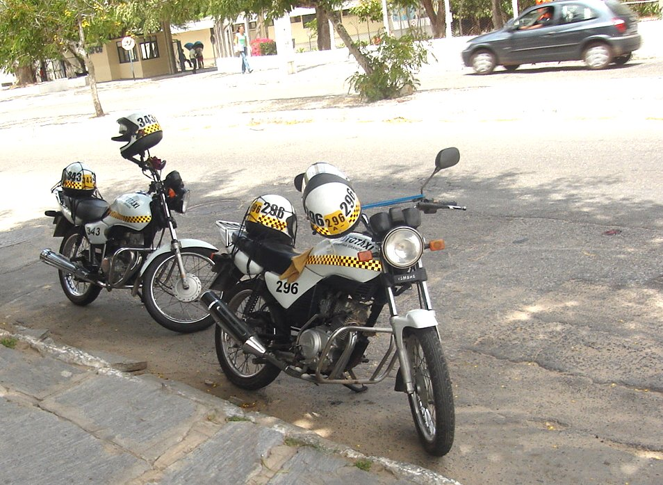 Moto-táxis de Campina Grande, Brasil.